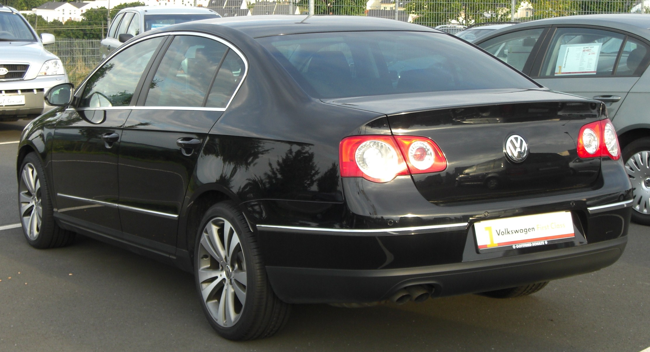 VW Passat